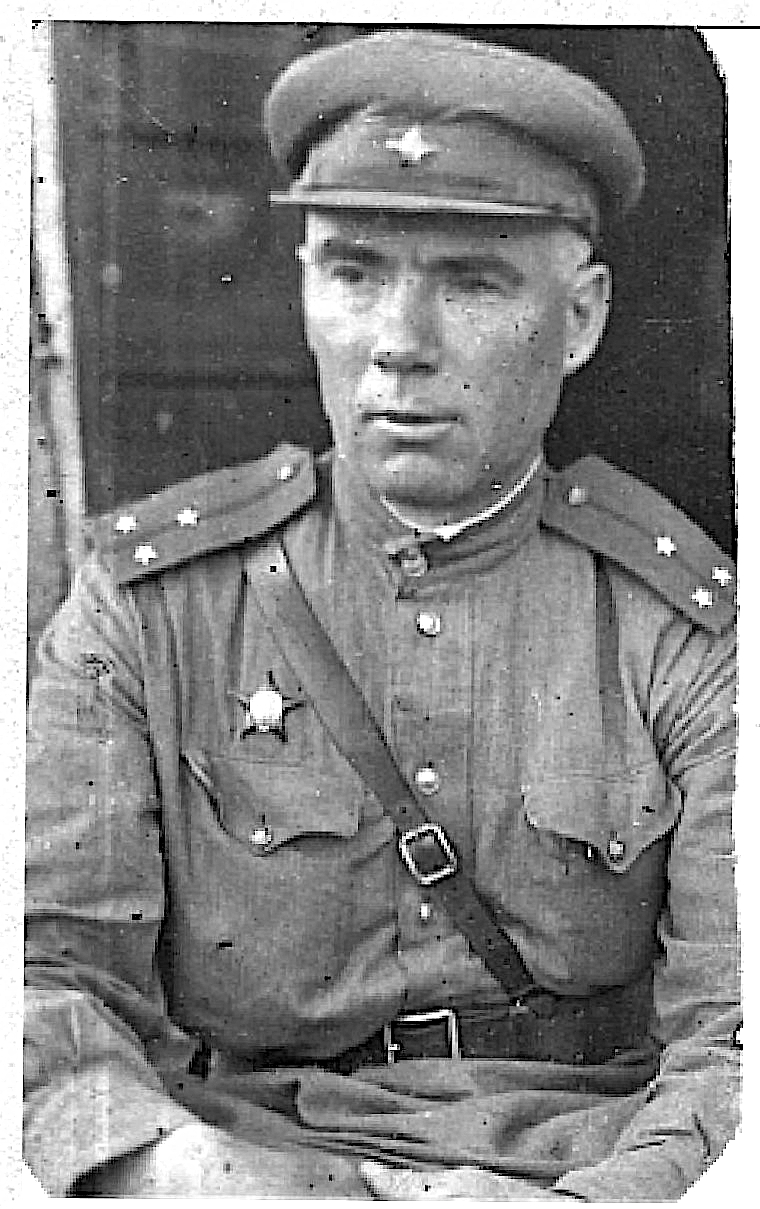 Остапенко Илья Афанасьевич 1904 - 29.12.1944